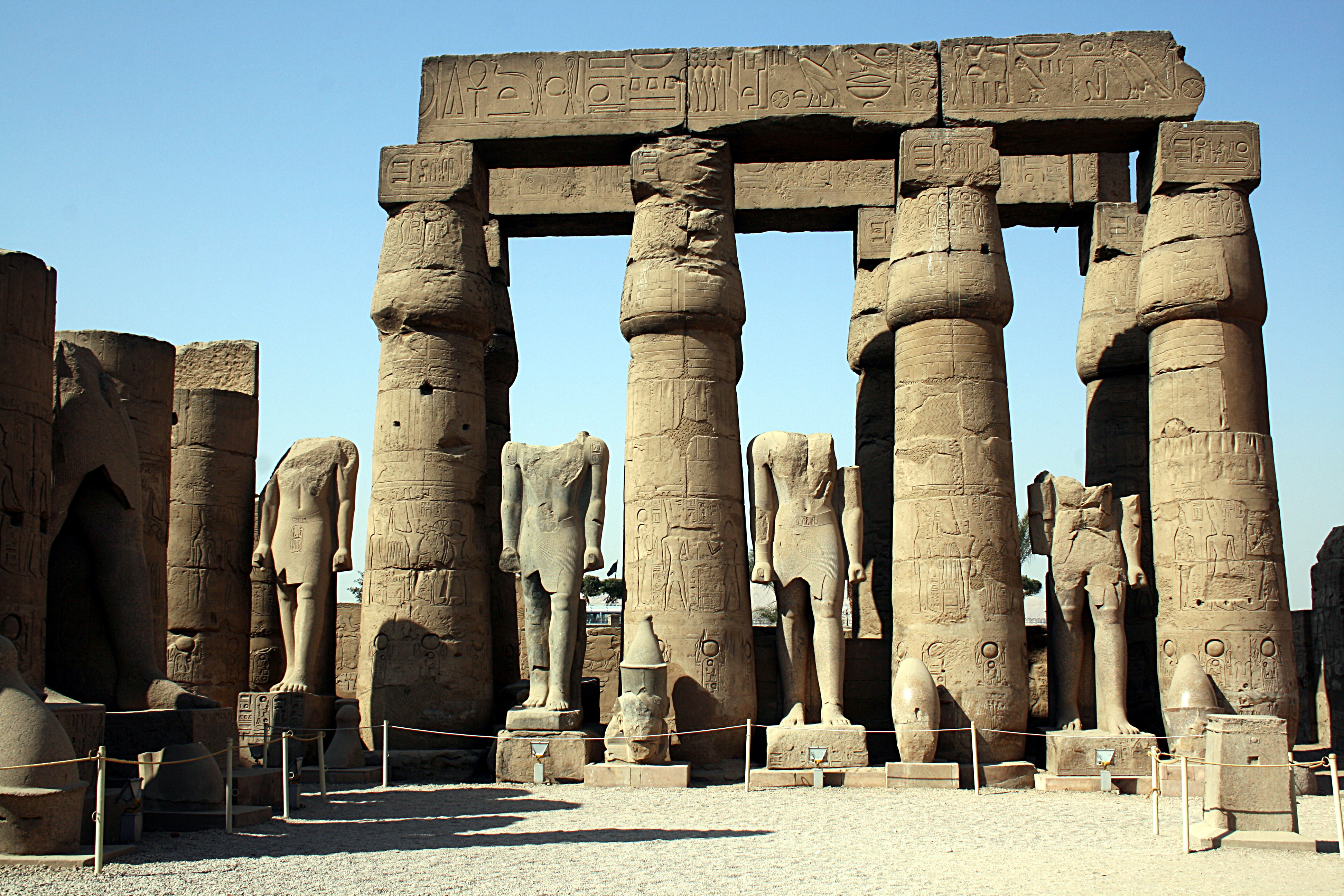 Luxor Tempel